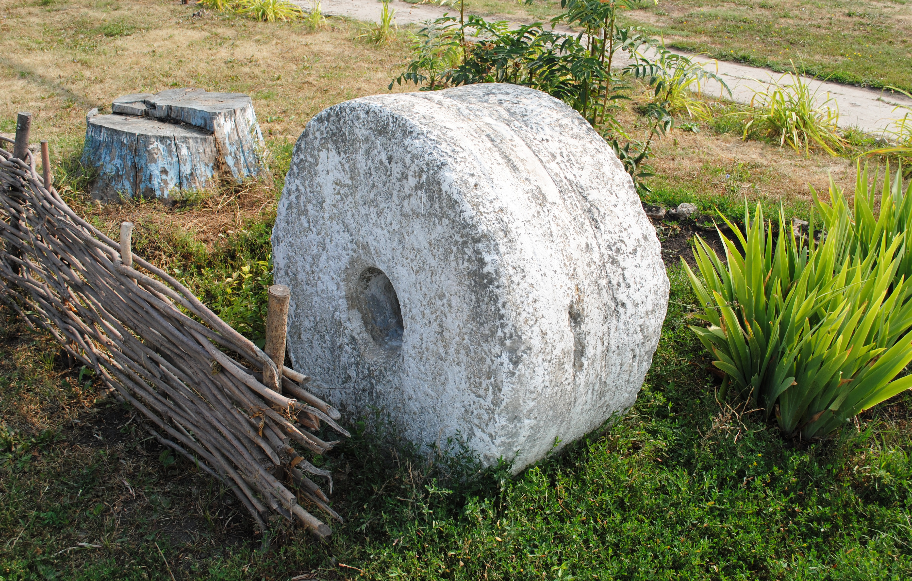 Жернов из Успенки